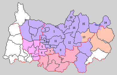 奈良県添上郡の町村制時点の町村。